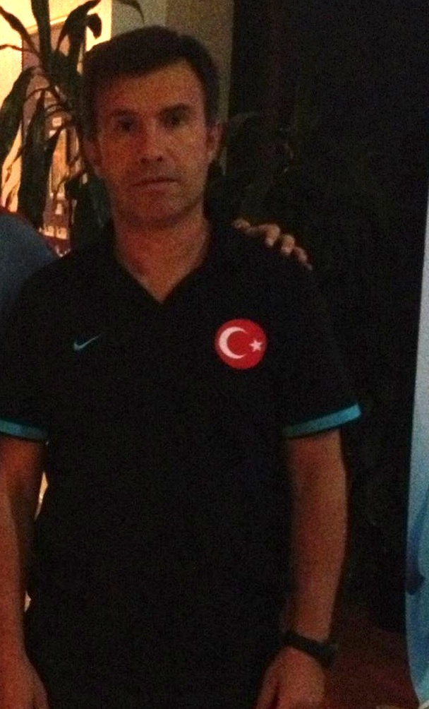 Feyyaz Uçar ile çektirdiğim bir fotoğraf